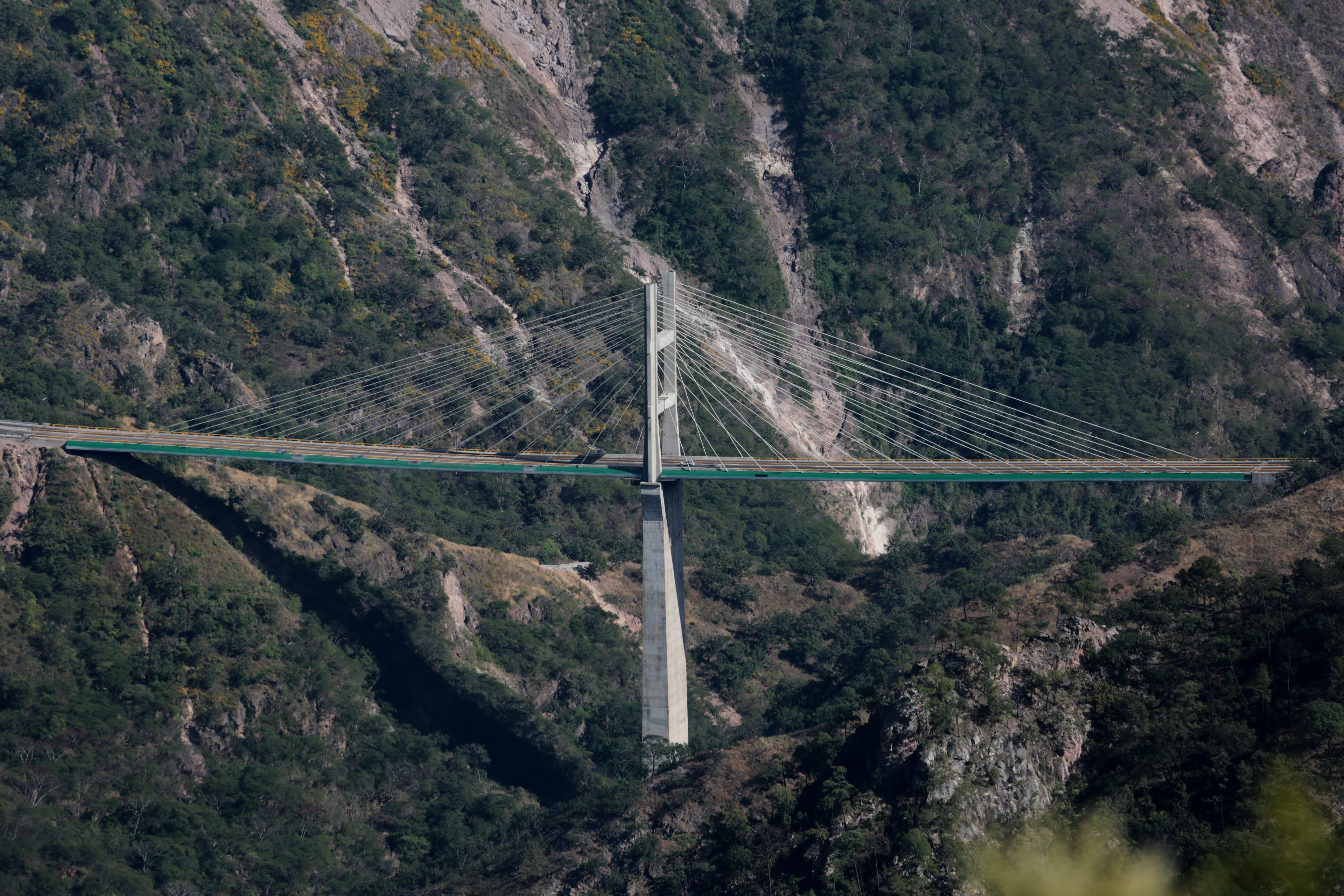 Puente el Carrizo